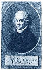 Portret van Prof. Henri Guyot.